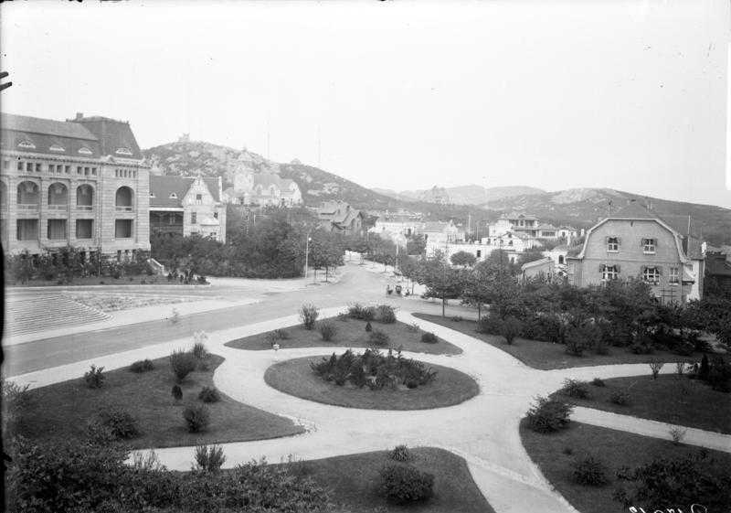 Schutzgebiet Kiautschou Tsingtau Okt. 1913: Blick auf den Diederichsweg